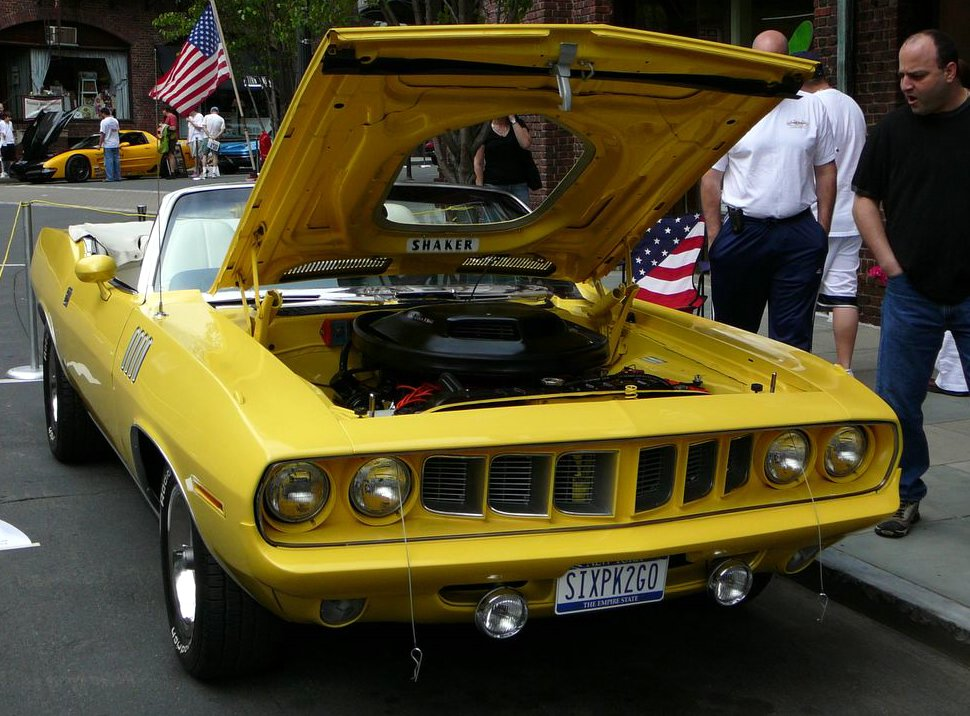 440 (7,2 Liter) Cuda (1971).